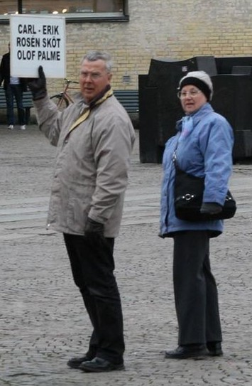 Stellan Hagmalm med fru, Stortorget Lund